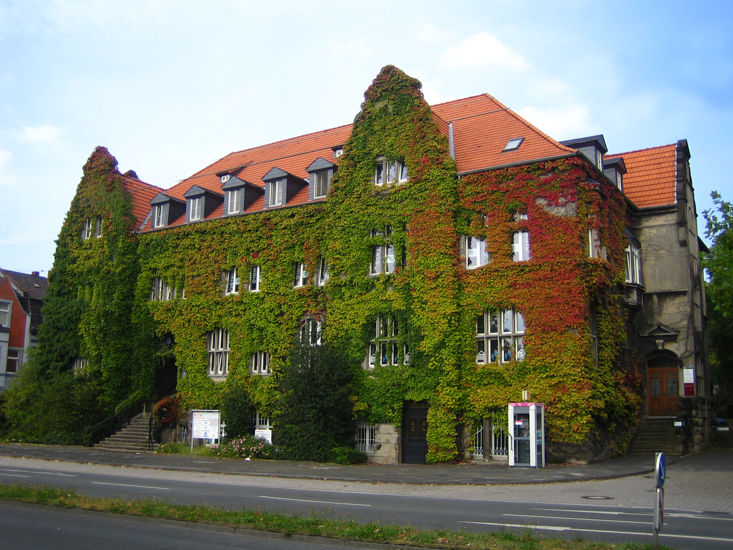 Beschreibung, Quelle und Lizenz Beschreibung: altes Rathaus der Stadt Castrop-Rauxel Quelle: selbst fotografiert Fotograf oder Zeichner: Christian Schürmann Datum: 18.04.2005 Licensing